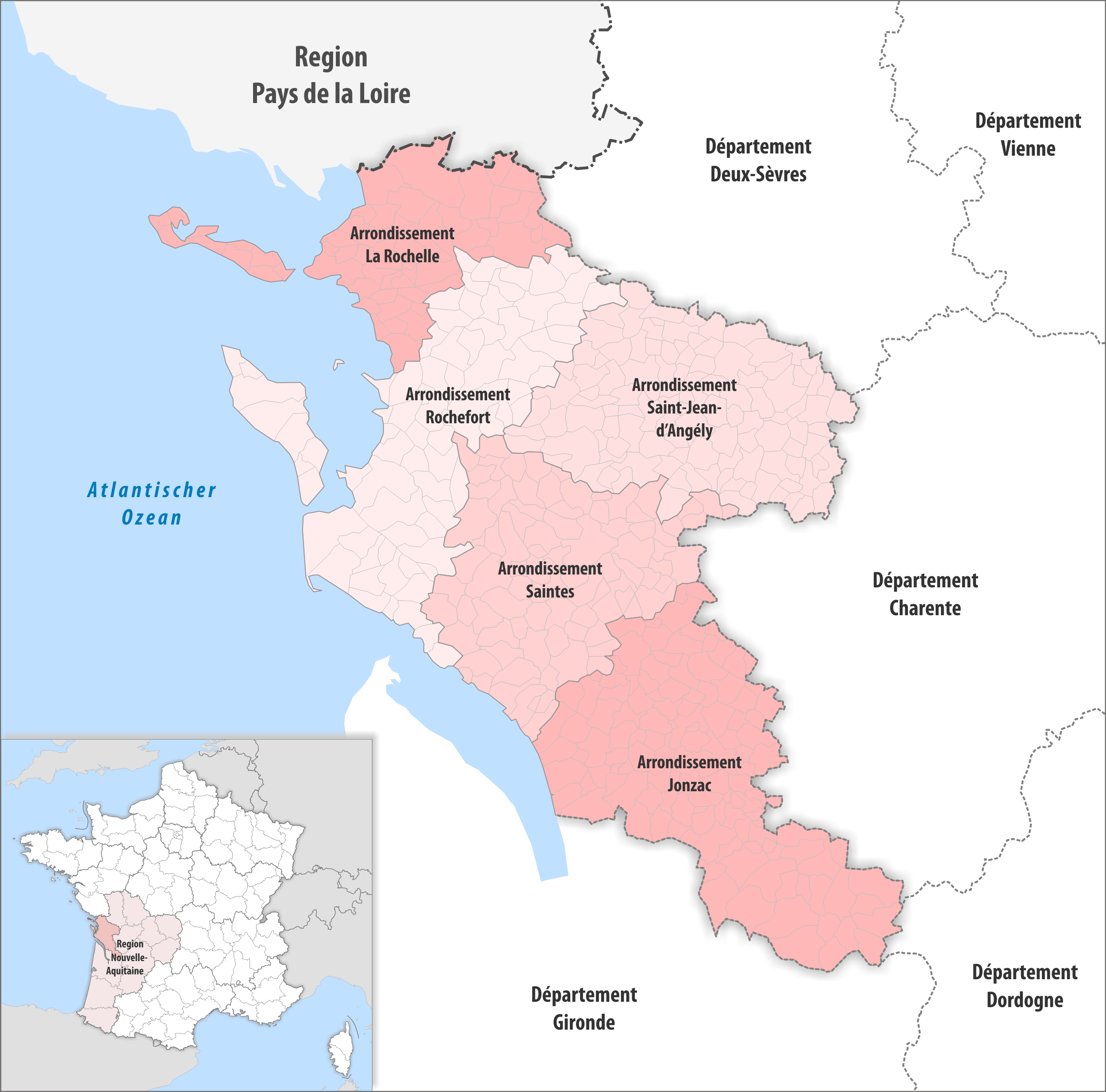 Gemeinden und Arrondissemente im Departement Charente-Maritime